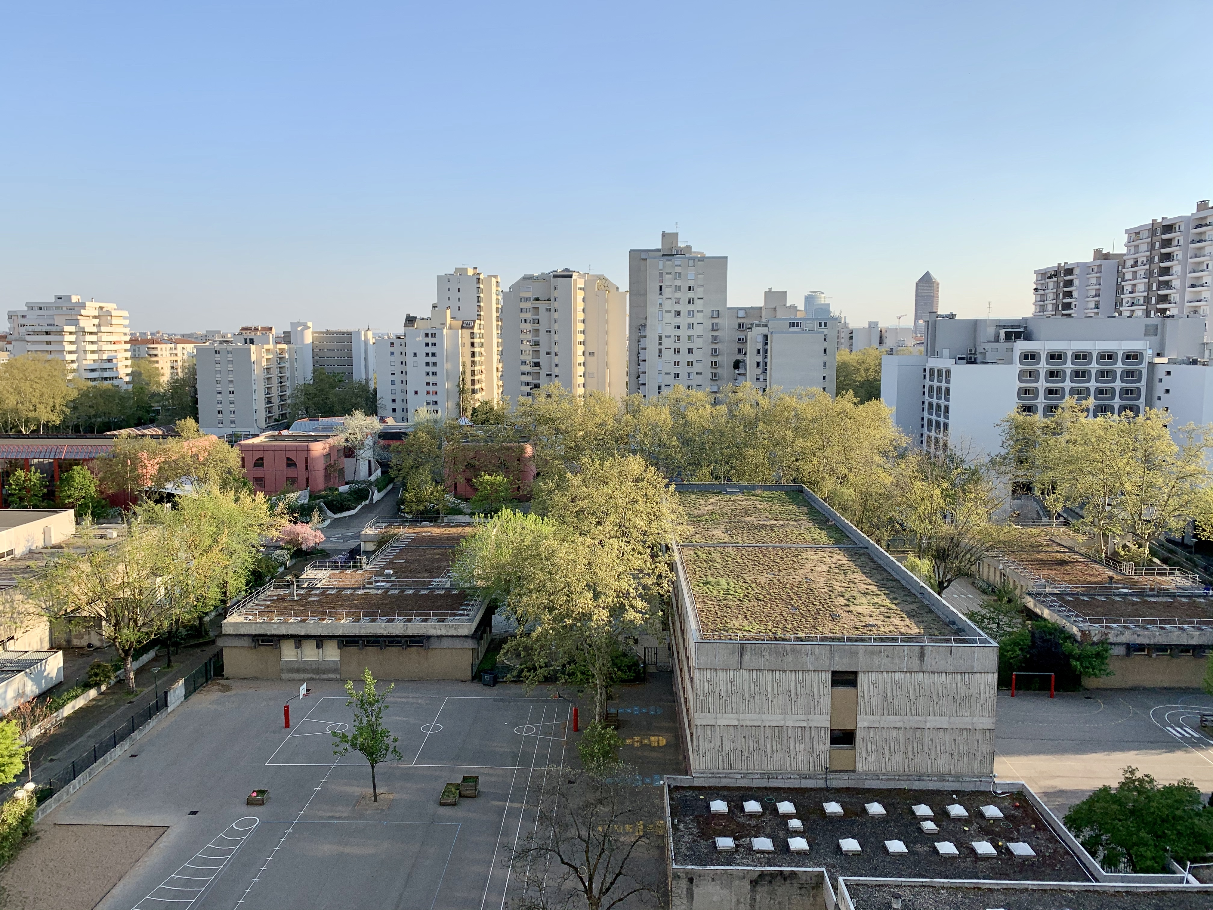 Vue sur le quartier Le tonkin et du collège Louis Armand à Villeurbanne au printemps 2020.